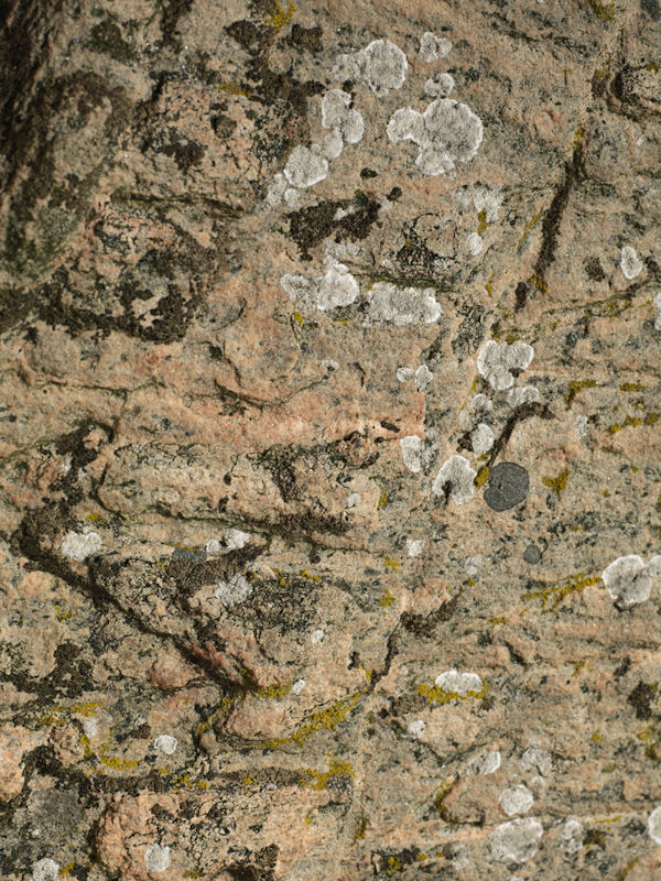 Foto: nationalmuseet ved Roberto Fortuna